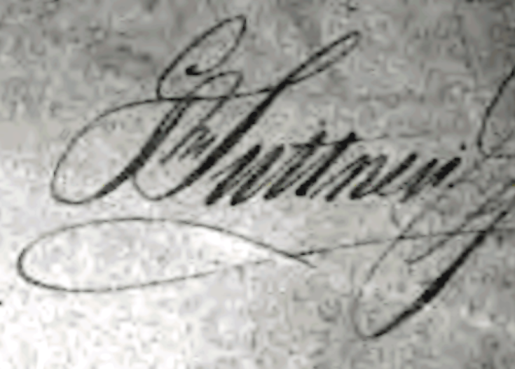 Unterschrift des Gustav Freiherrn von Suttner (1826-1900)